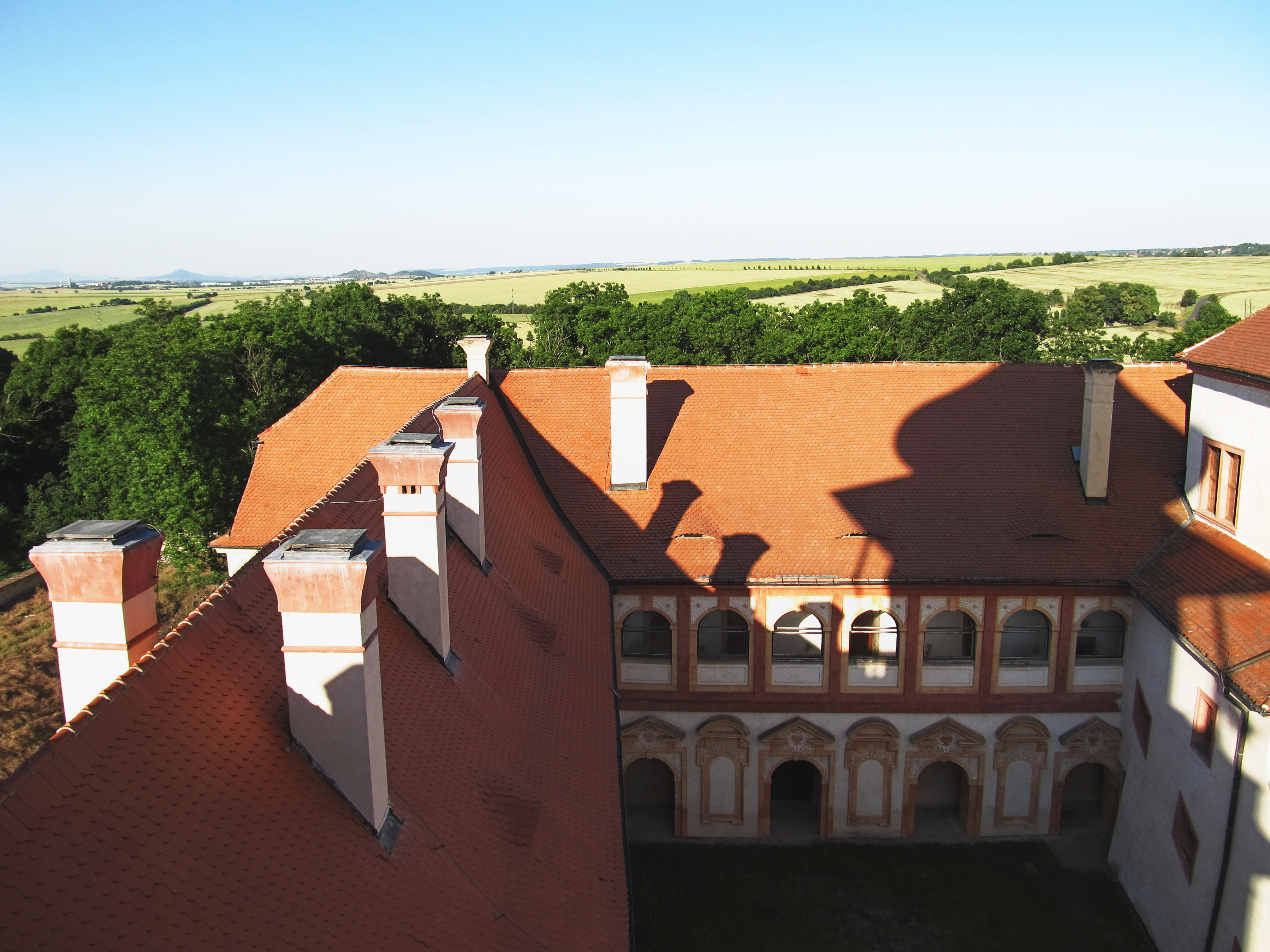 Výhled z věže na třetí nádvoří